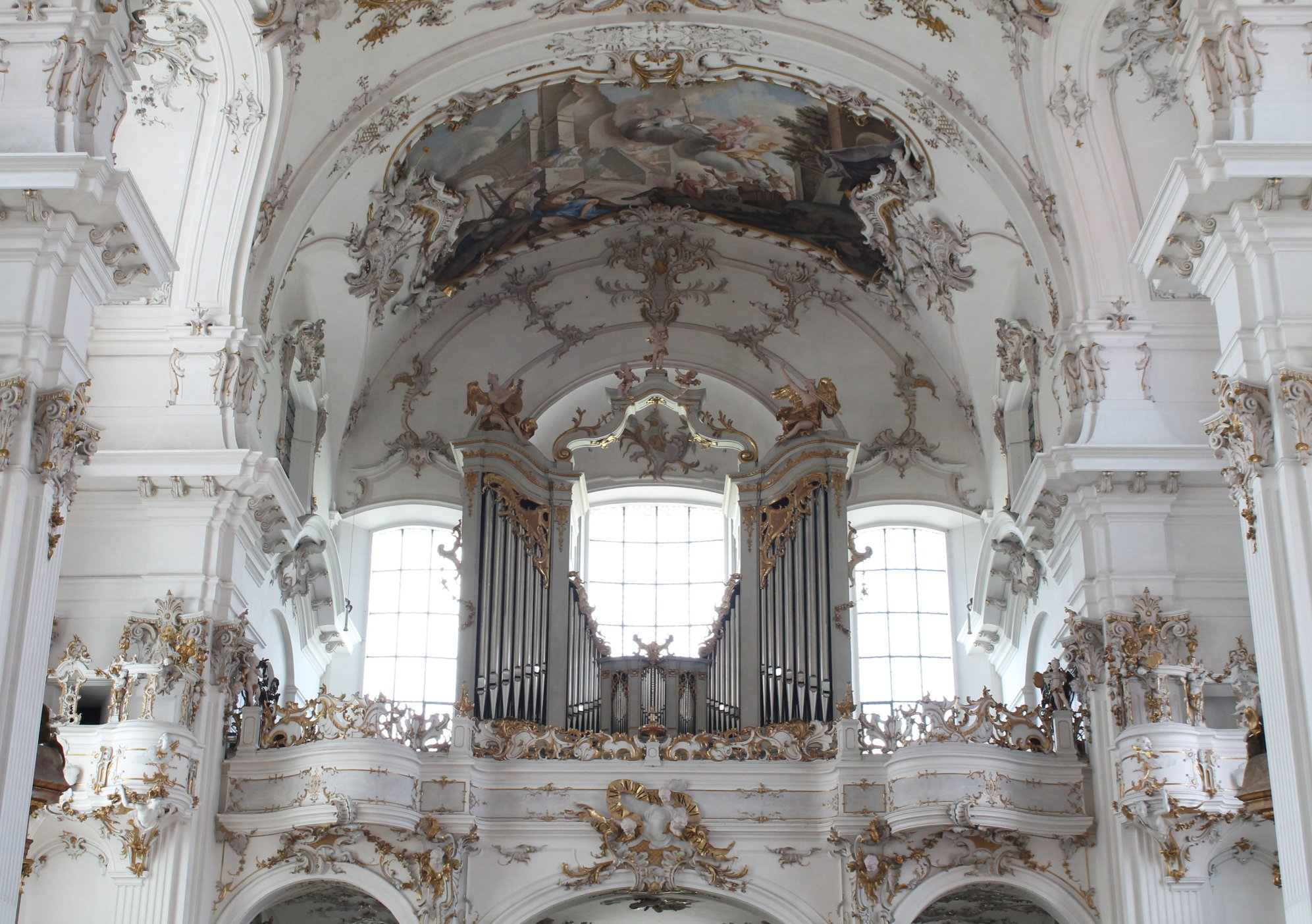 Dießen am Ammersee, Marienmünster Dießen, Orgel von Caspar König (1739)